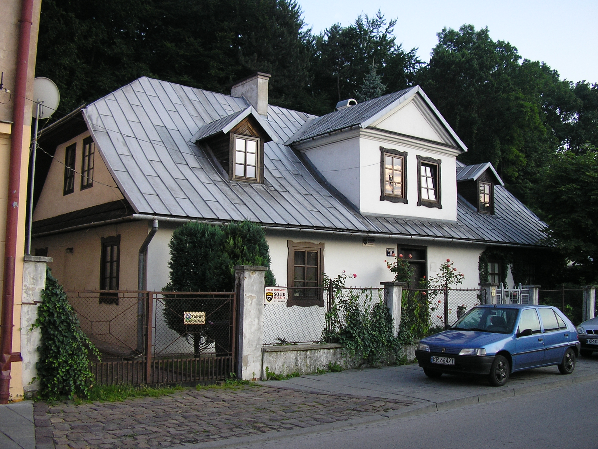 Dworek. Kraków, ul. Zamoyskiego 12.